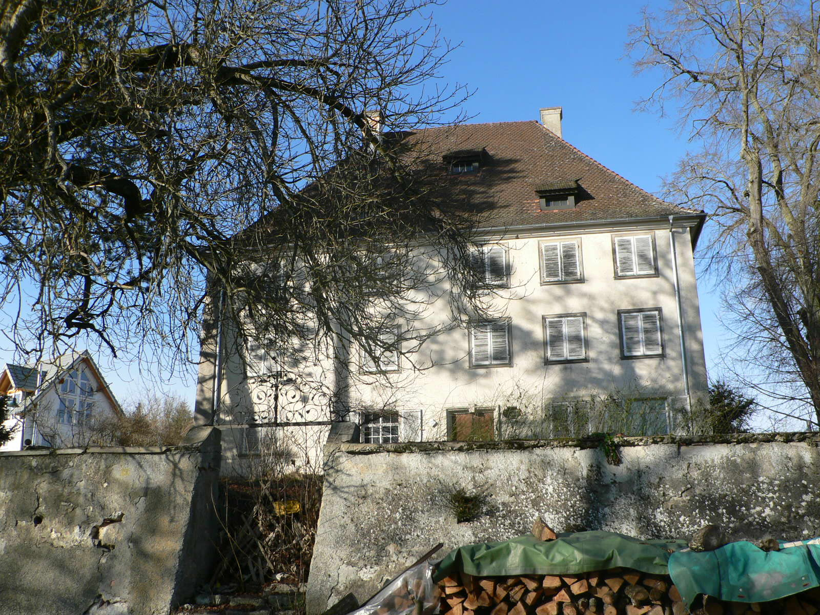 Ansicht von Schloss Mühlingen